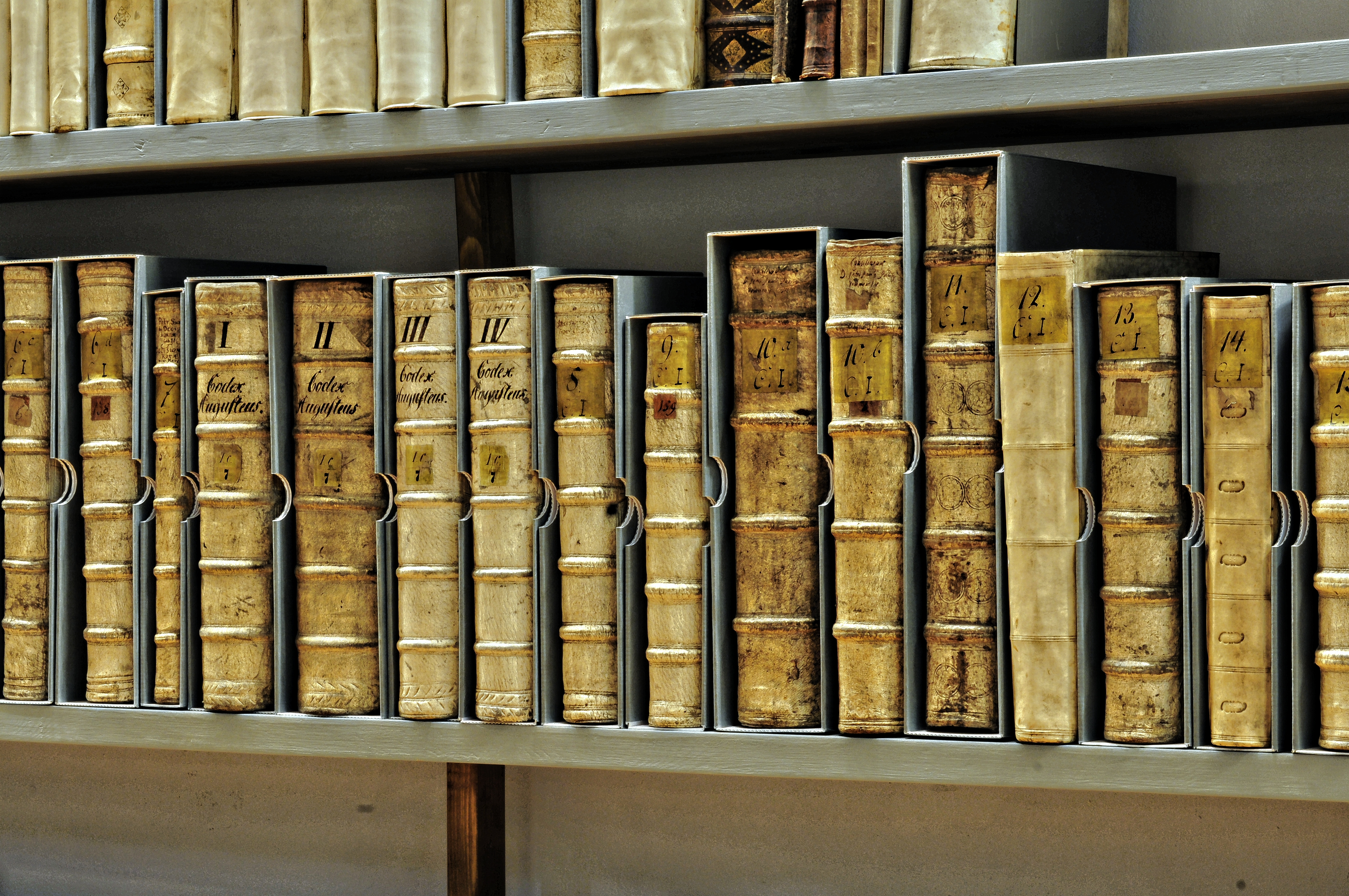 Oberlausitzische Bibliothek der Wissenschaften